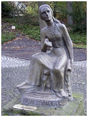 Agnes-Miegel-Denkmal in Bad Nenndorf Fotograf: taken by User:Tortuosa Copyright: GNU Freie Dokumentationslizenz Source: copied from de.wikipedia